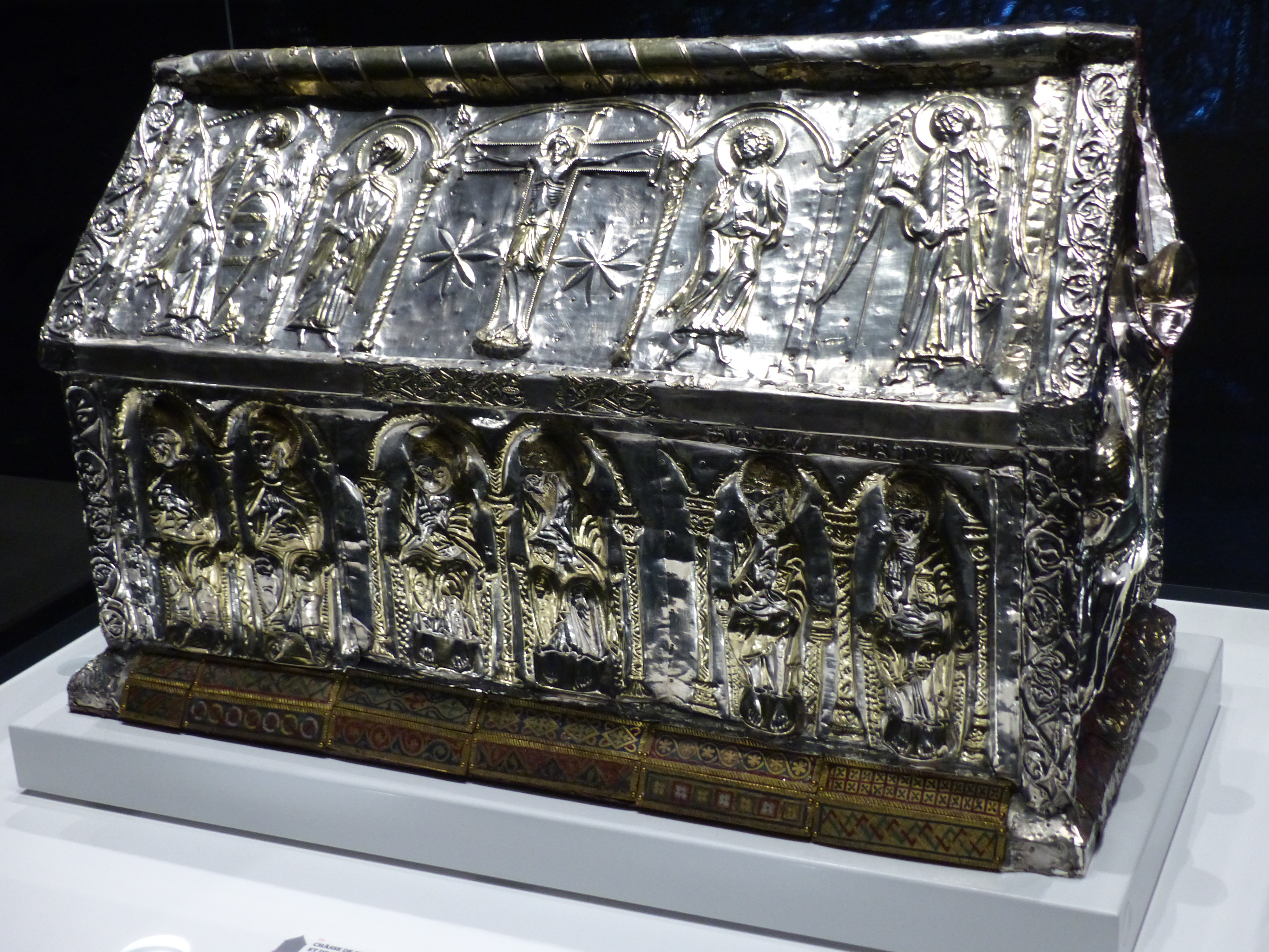 Schrein des hl. Sigismund und seiner Söhne, Werkstatt St. Maurice, ca. 1150-1200. Abbaye de Saint-Maurice d'Agaune.